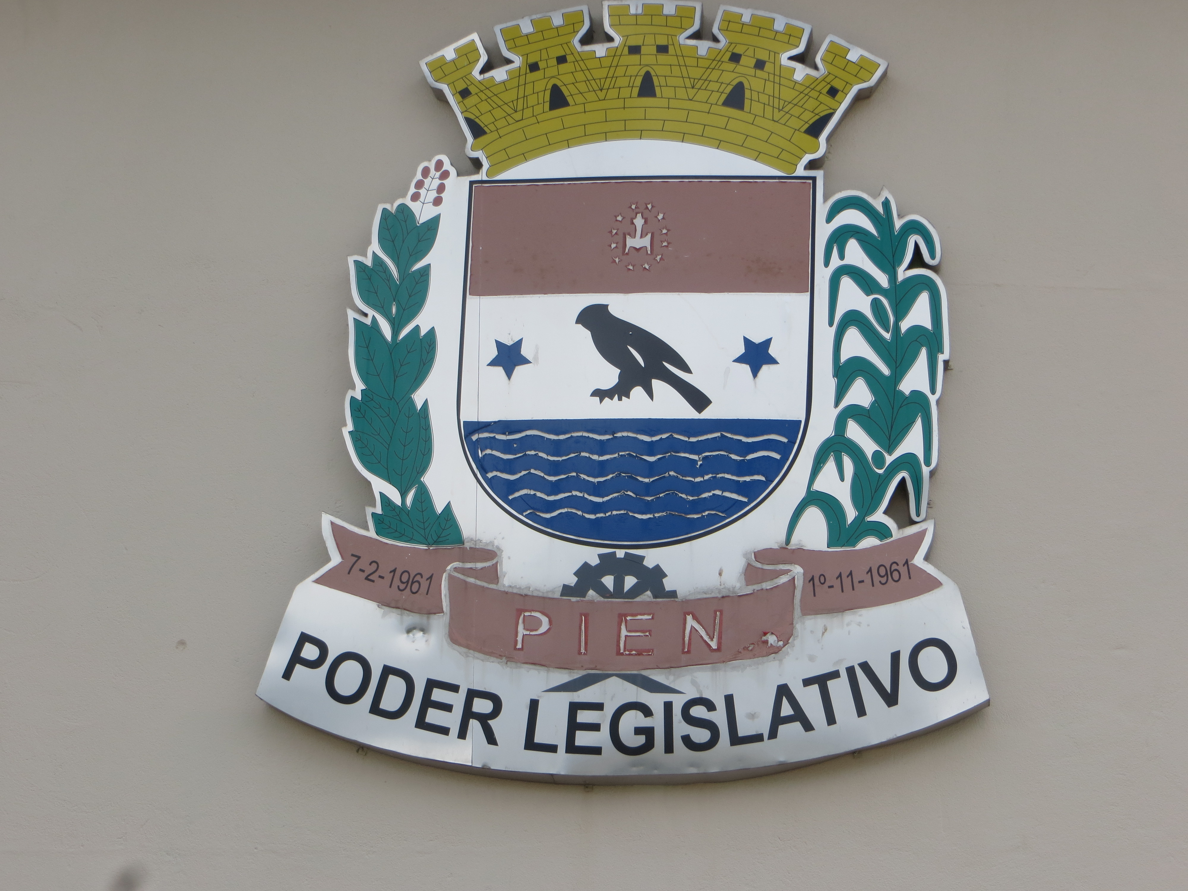 Brasão de Armas Municipal na fachada da Câmara de Vereadores de Piên, Estado do Paraná, Região Sul do Brasil